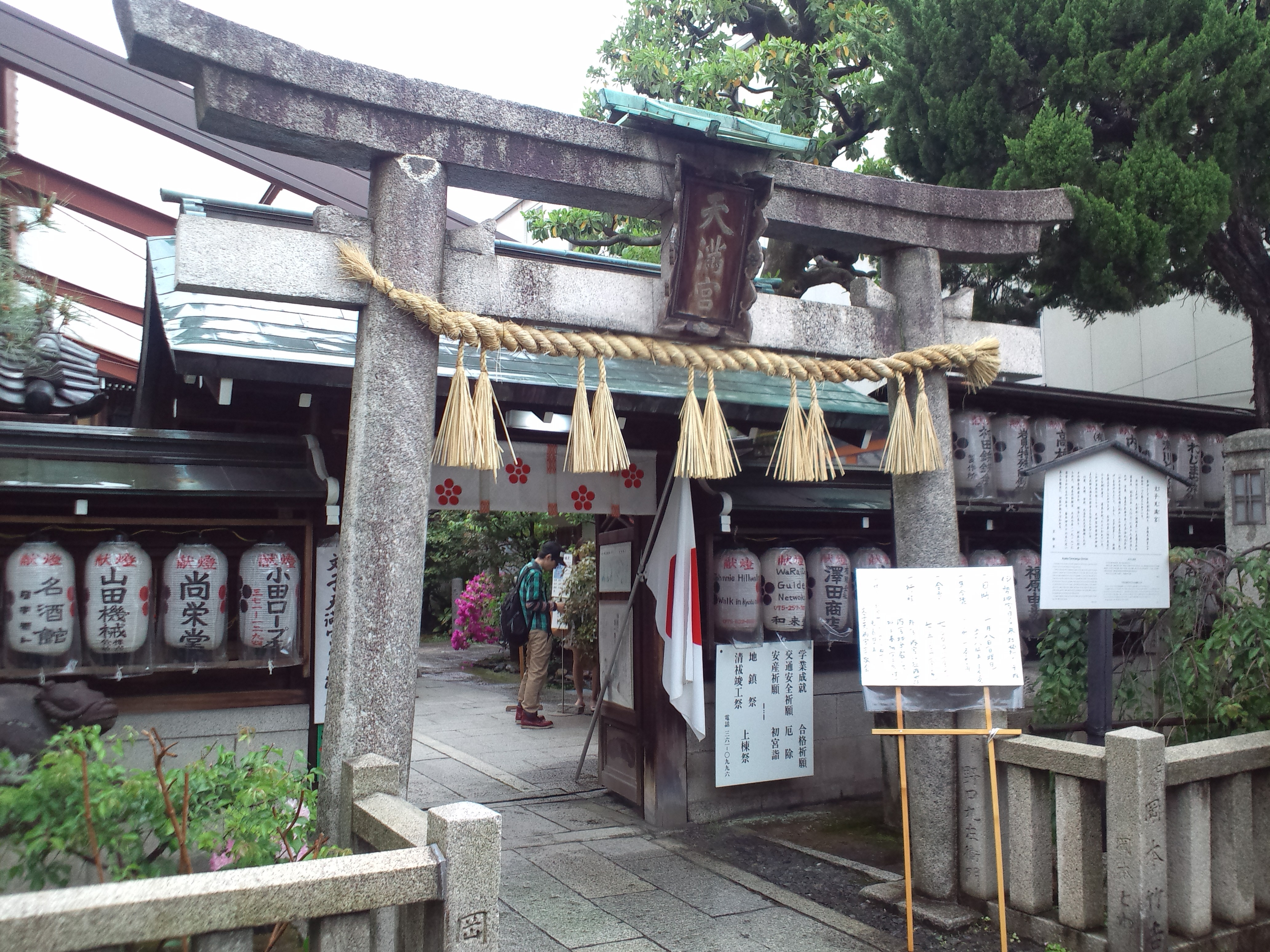 文子天満宮 入口の石鳥居